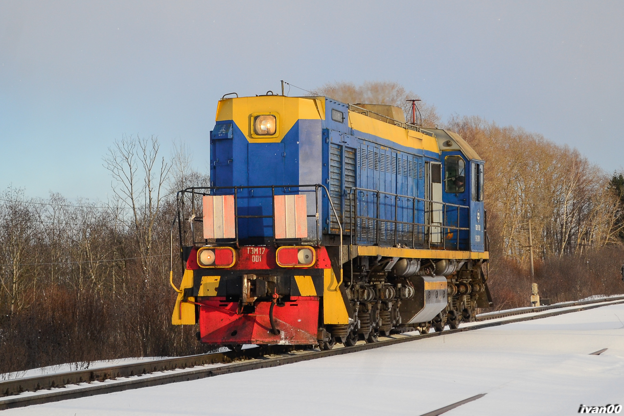 В декабре 2017 г. передан в парк ТЧЭ-31 Великие Луки